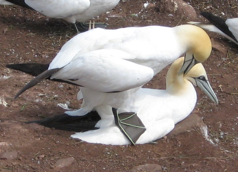 Accouplement de fou de bassan sur l'île de Bonaventure en Gaspésie au Québec. Photo par / taken by Frédéric Wagner Catégorie:Ciconiiformes Catégorie:Pelecaniformes Catégorie:Oiseau (nom vernaculaire)